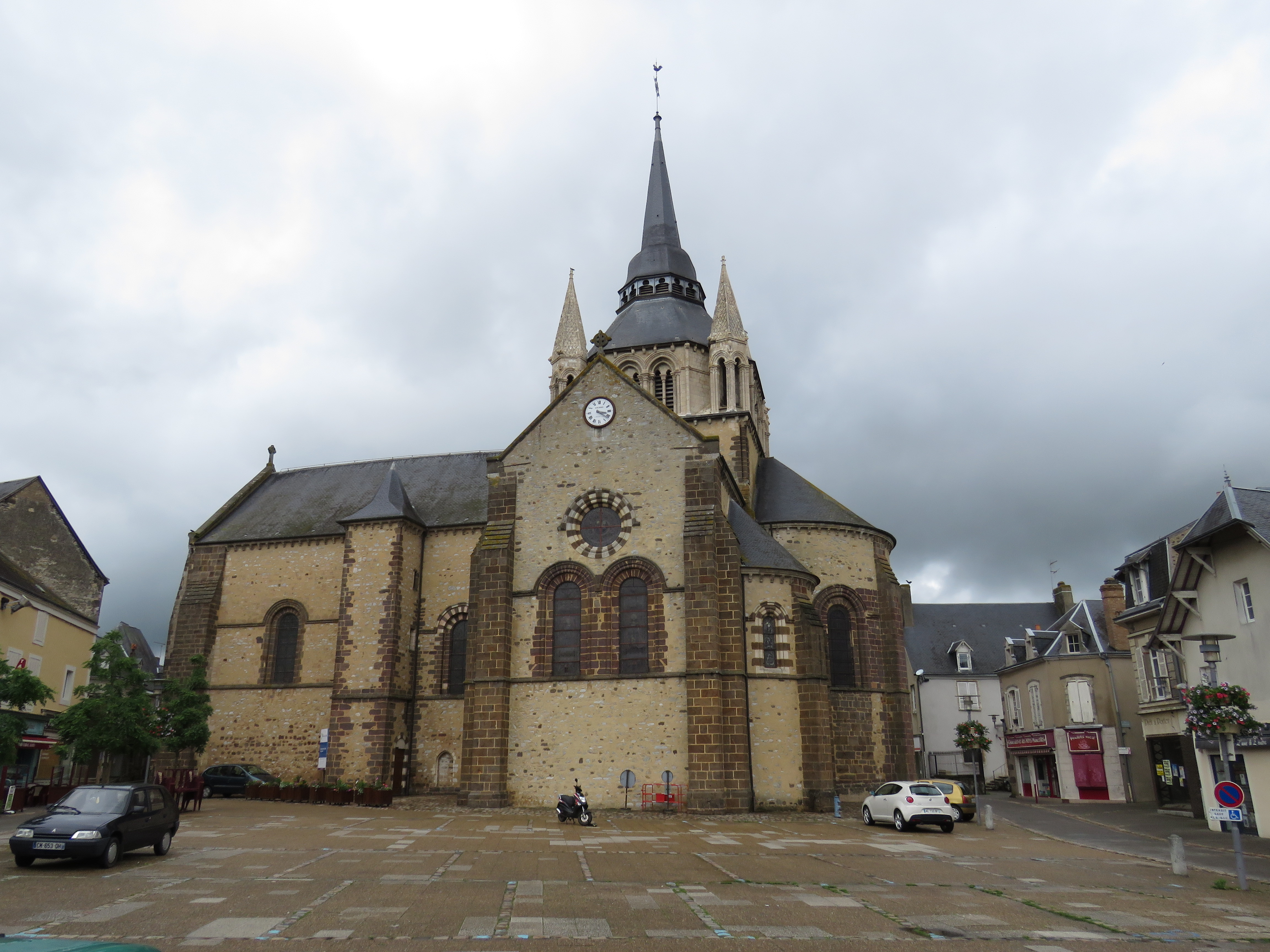 Vue de l'église depuis la place de la République.